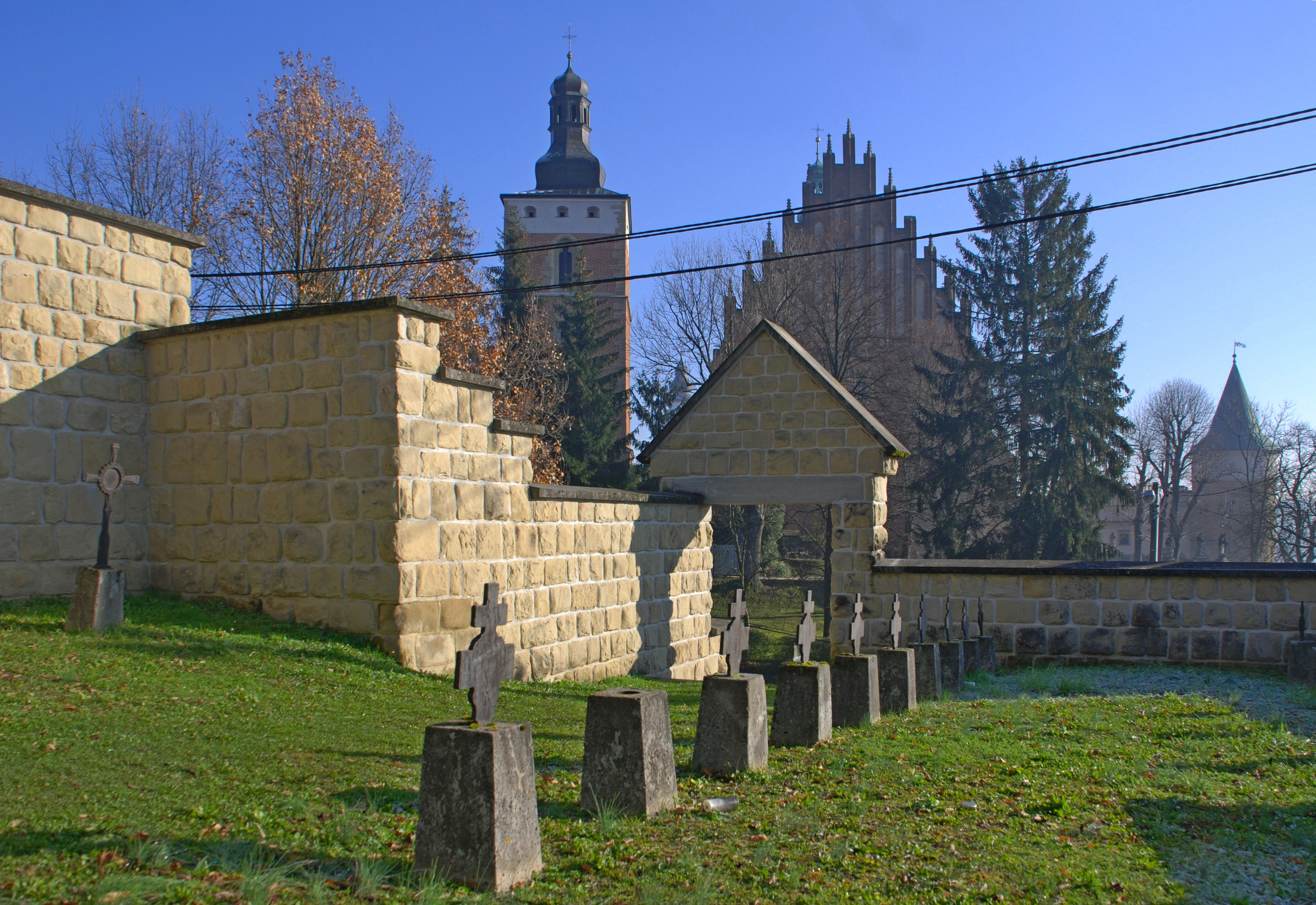 miasto Biecz